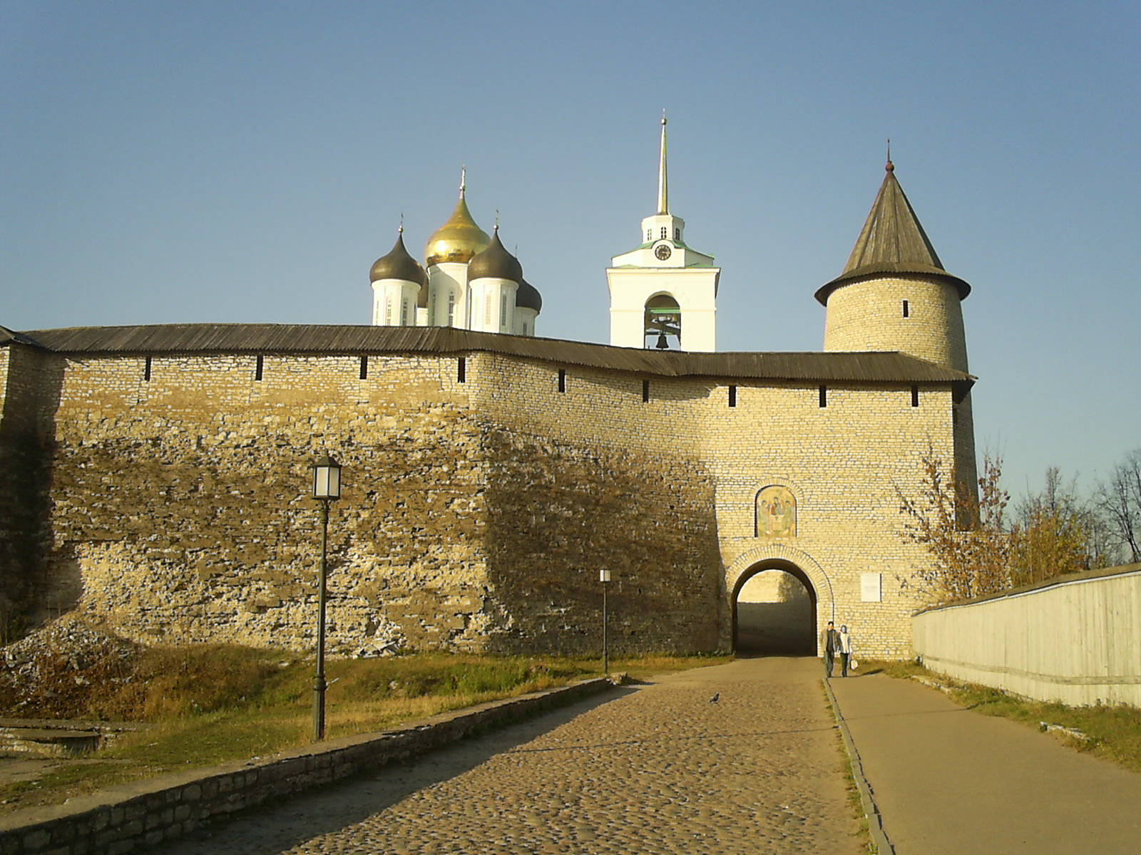 kremlin de Pskov